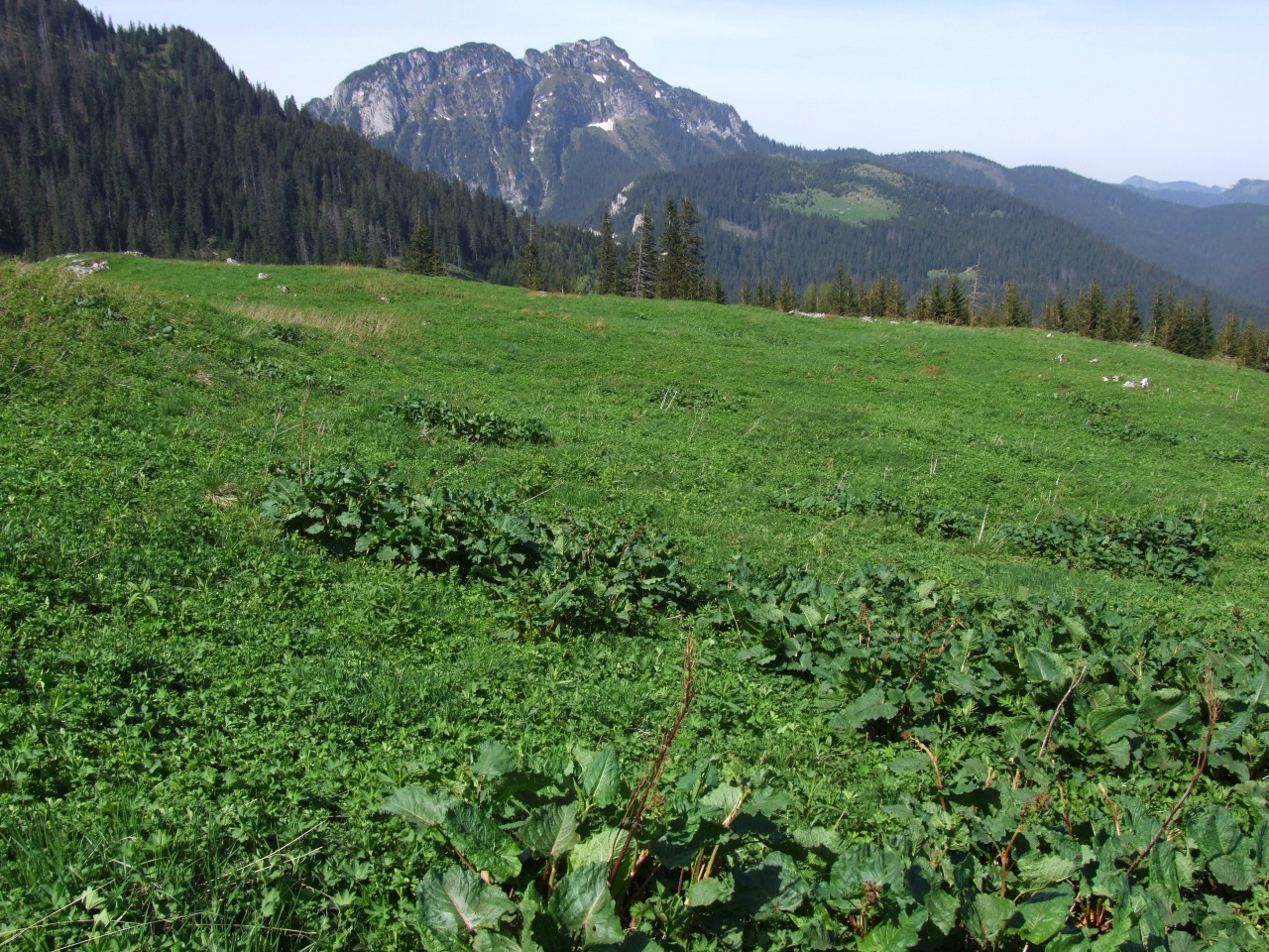 Polana Upłaz i widok na Kominiarski Wierch i Stoły